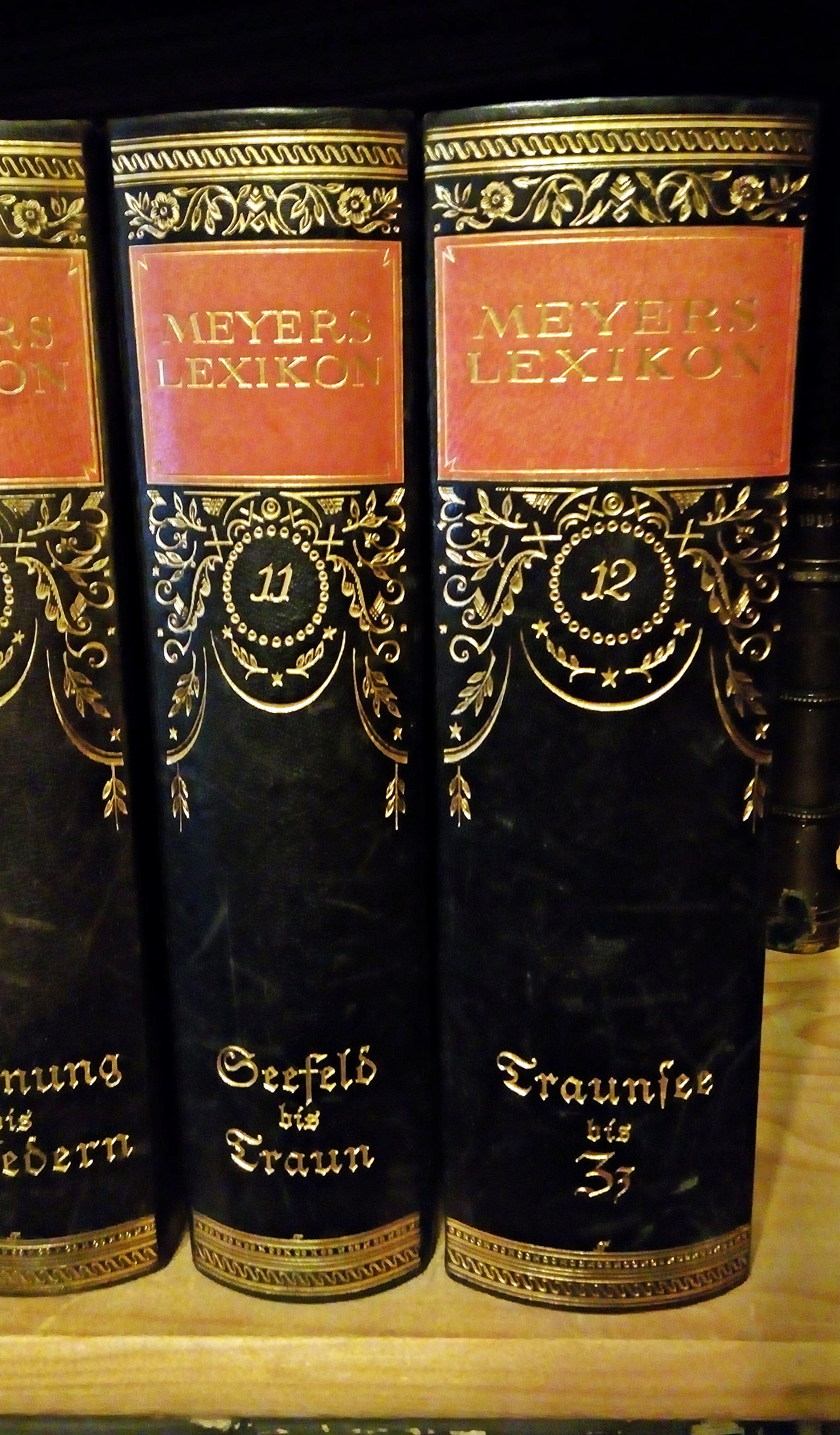 Meyers Konversation Lexikon 7. Auflage (1924-1930)